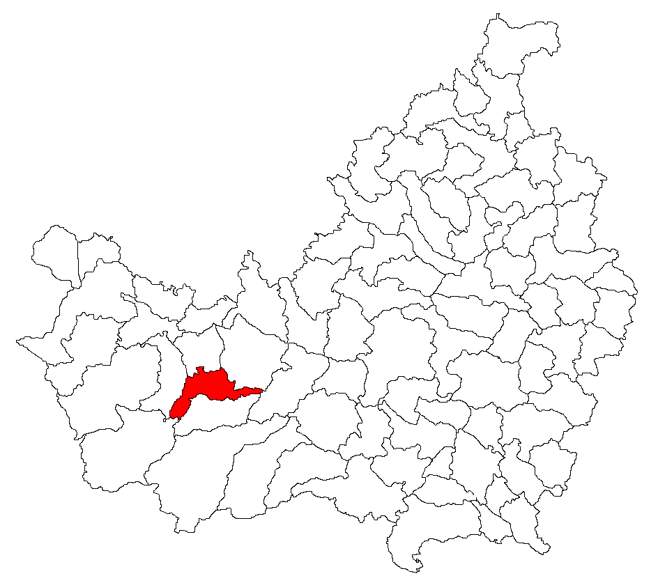 Categorie:Hărţi ale judeţului Cluj